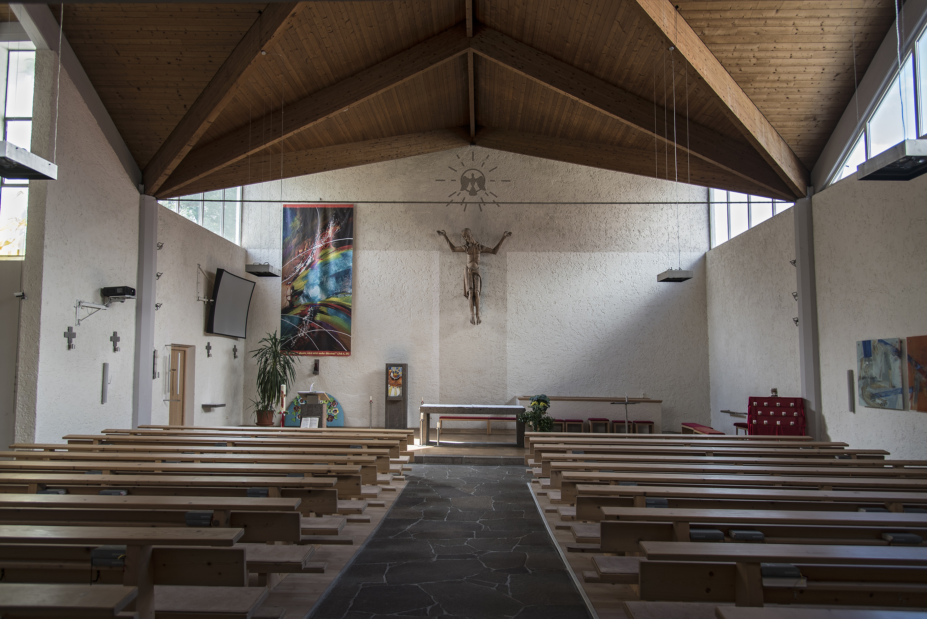 Kath. Pfarrkirche hl. Geist - Innenansicht